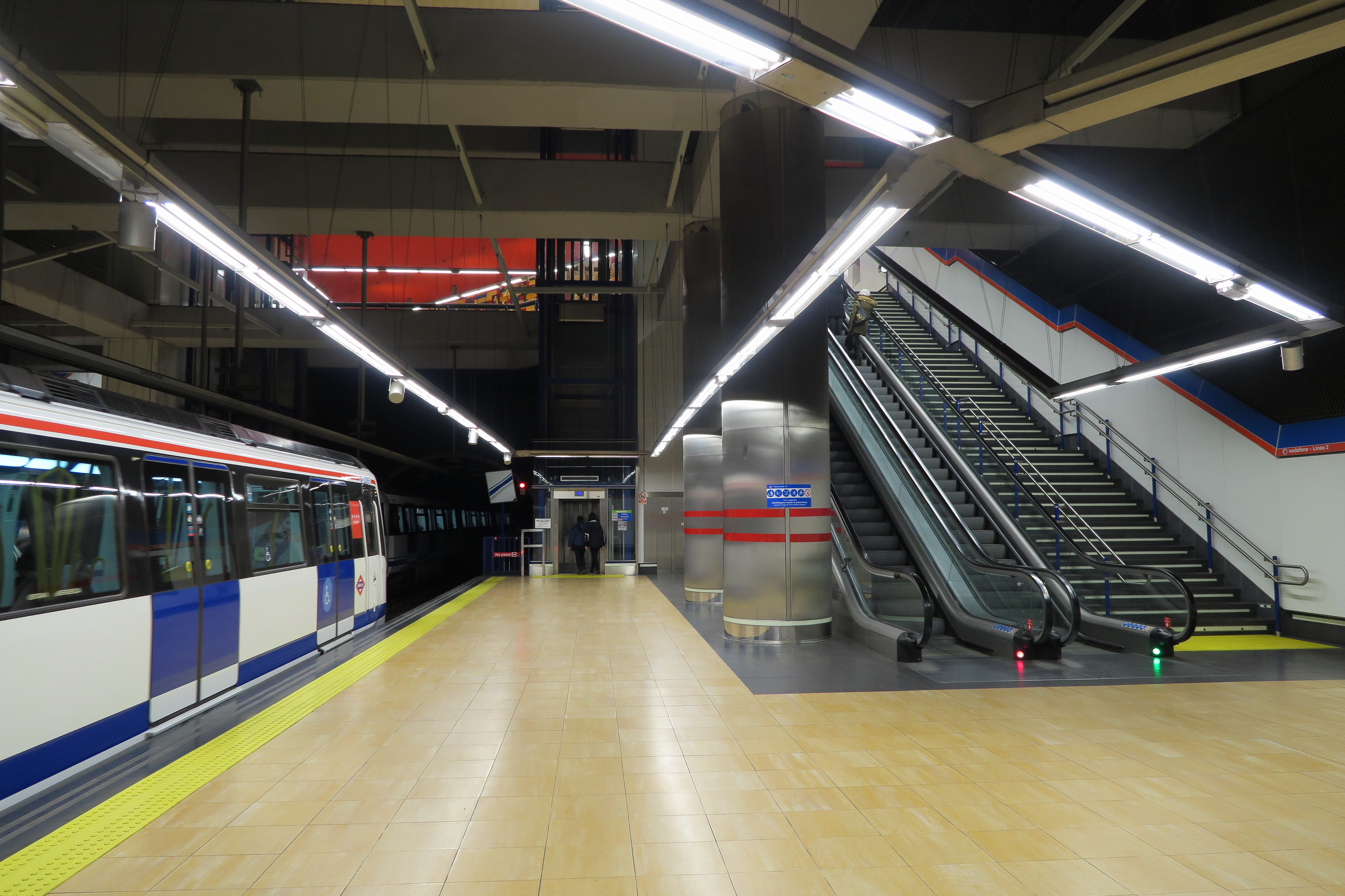 Estación de La Elipa, andén